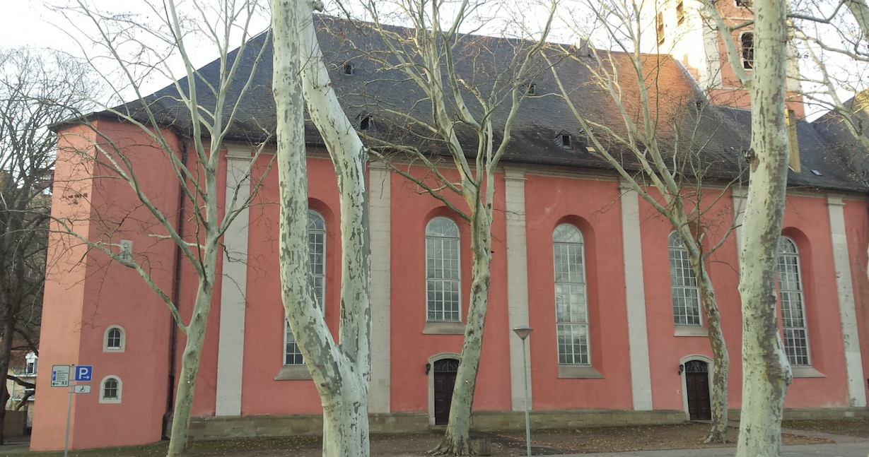 Pauluskirche Bad Kreuznach. Schiff von Süden gesehen